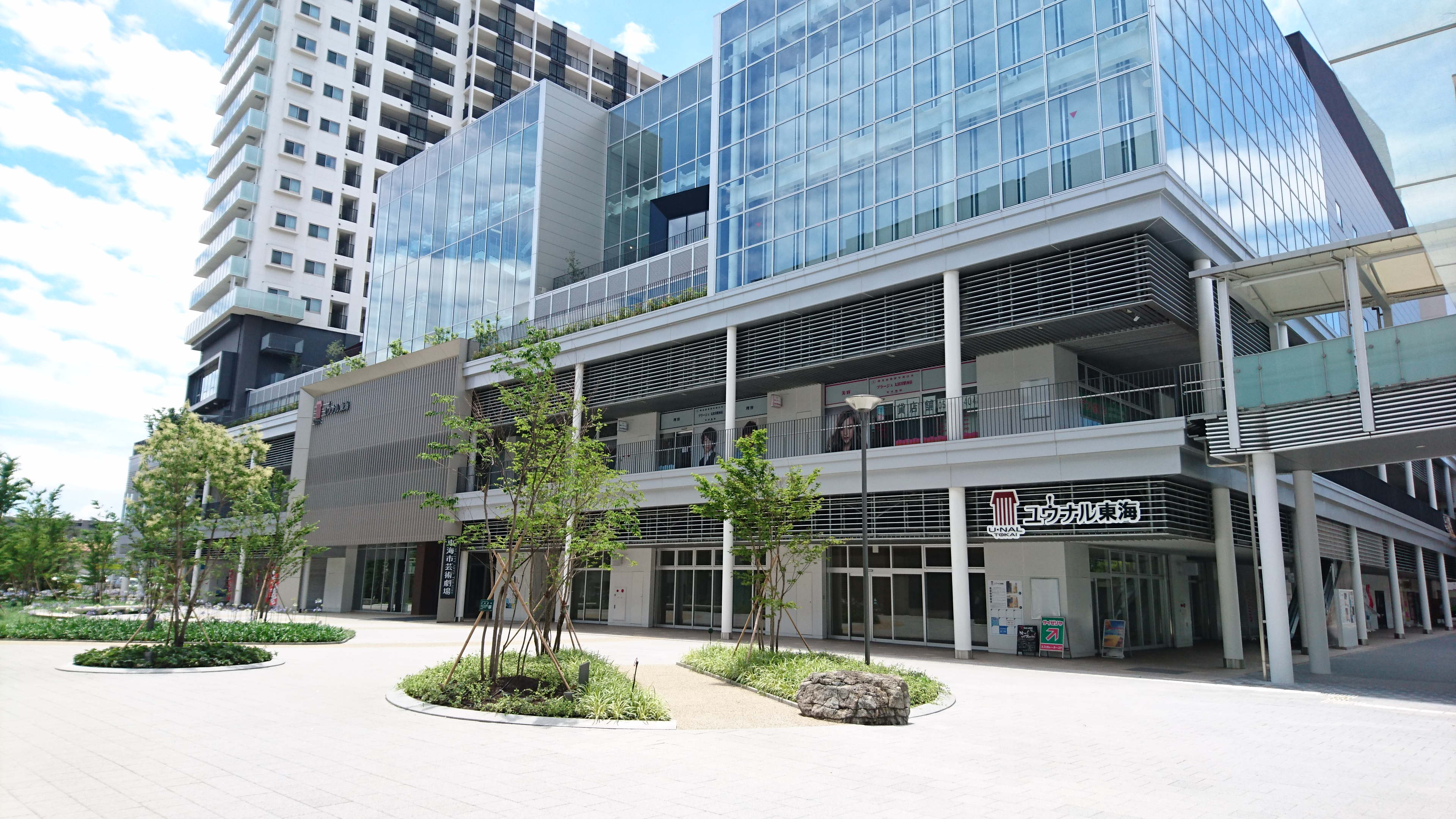 ユウナル東海